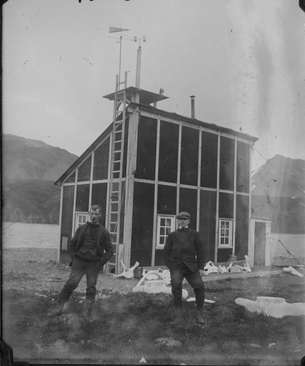 Casa del meteorologo argentino en Grytviken, Islas Georgias del Sur